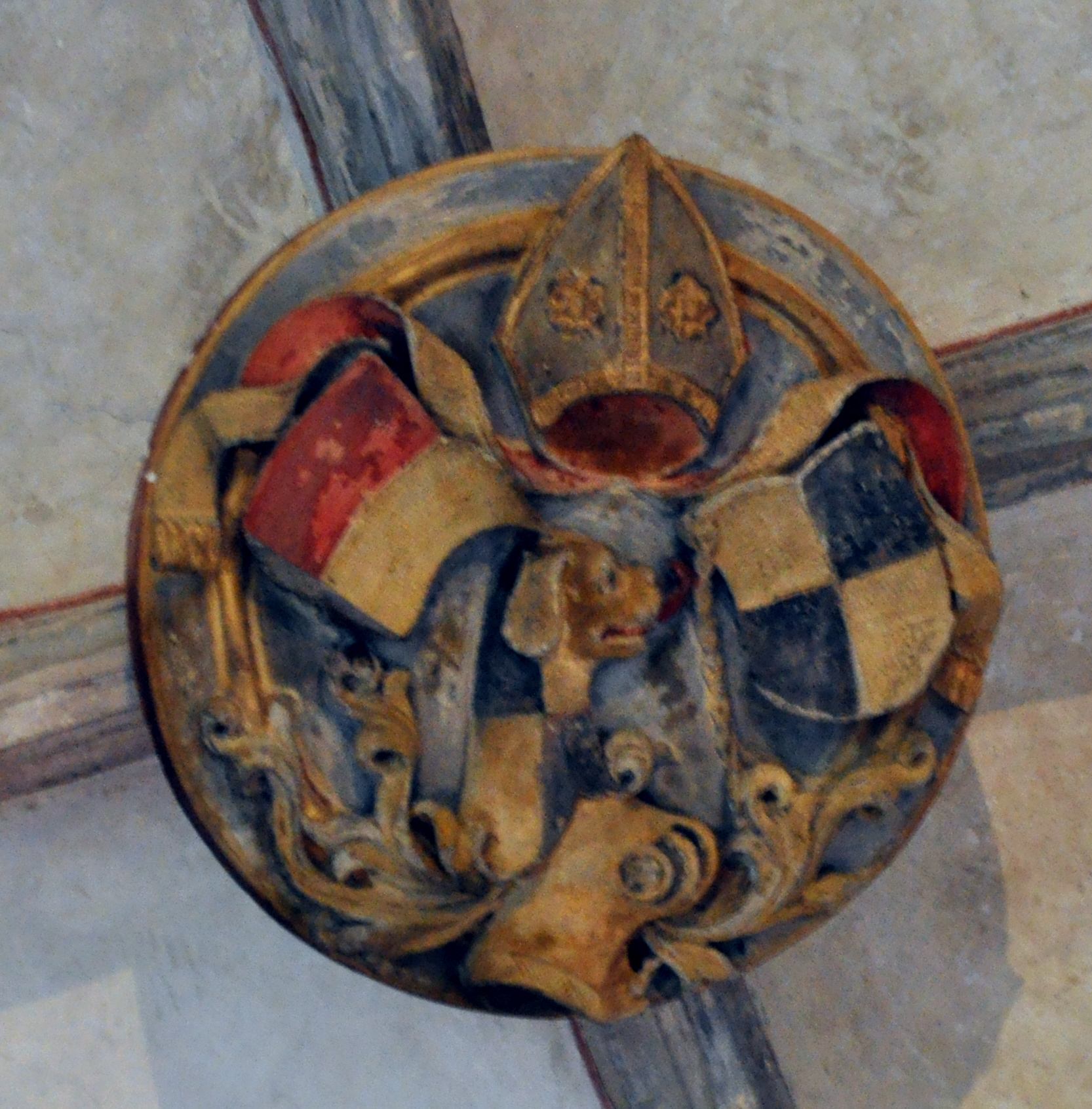 Augsburg, Dom, Kreuzgang, Gewölbe, Ostflügel, 2. Joch, Schlussstein (übereinstimmend mit dem Schlussstein des 1. Jochs); Wappen des Bischofs Friedrich II. von Zollern und Wappen des Hochstifts Augsburg; um 1486–1488